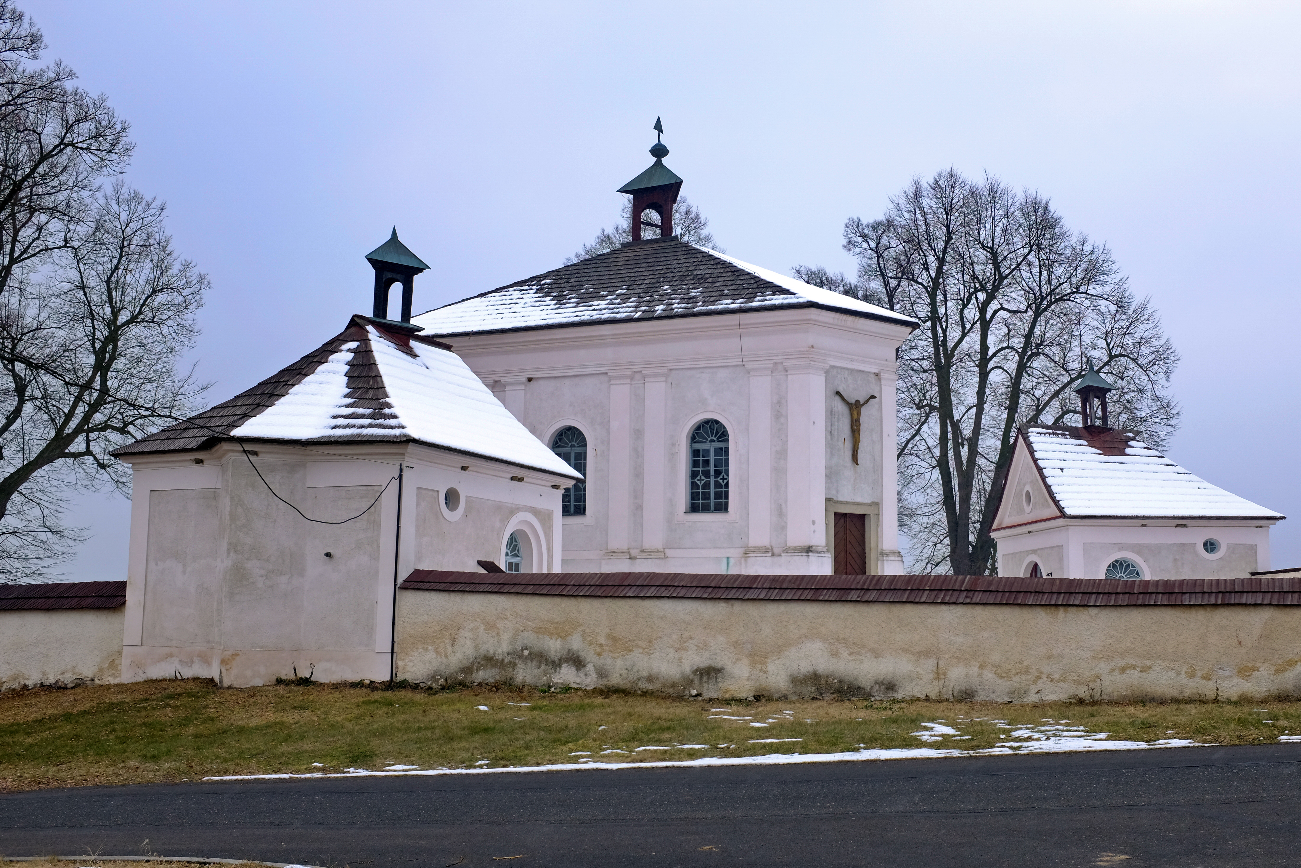 Kostel Nejsvětější Trojice, Andělská Hora, Andělská Hora (okres Karlovy Vary).